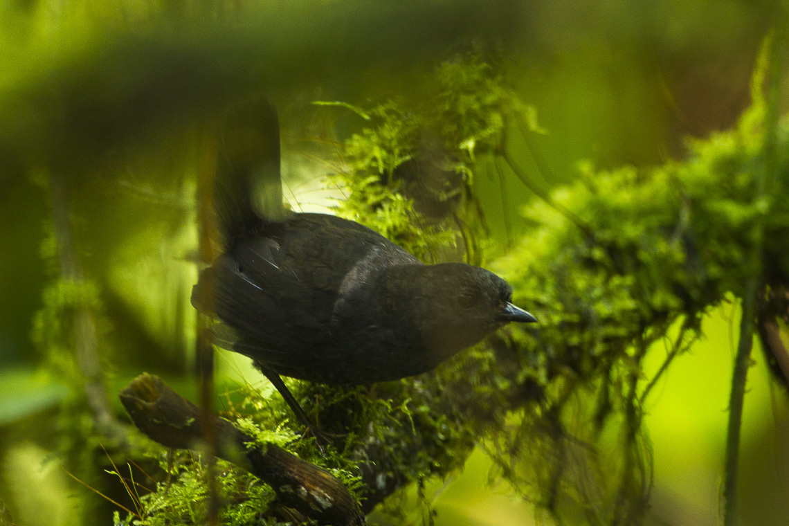 Narino Tapaculo - Colombia_S4E9464